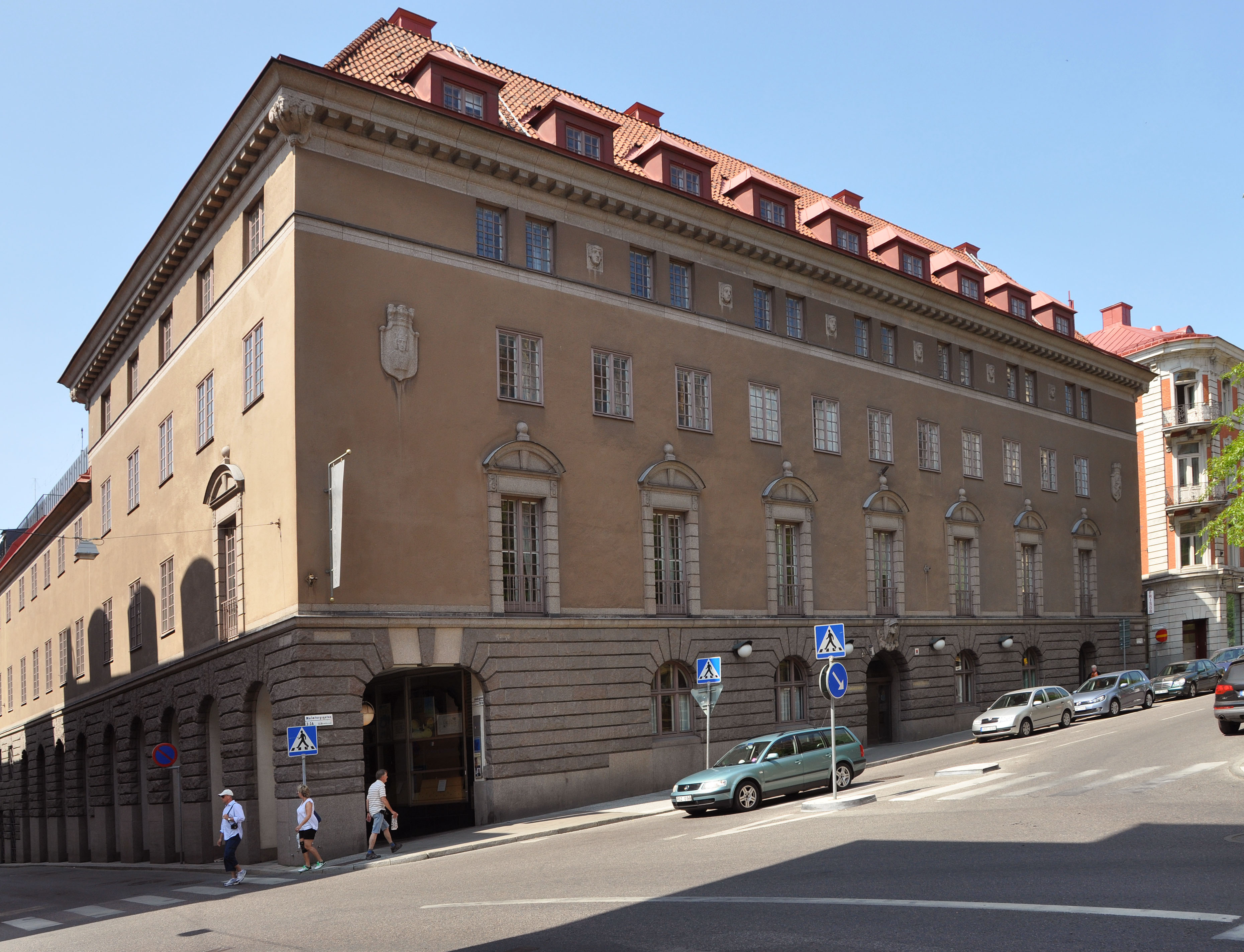 Nordiska banken, Malmtorgsgatan 3. Stockholm